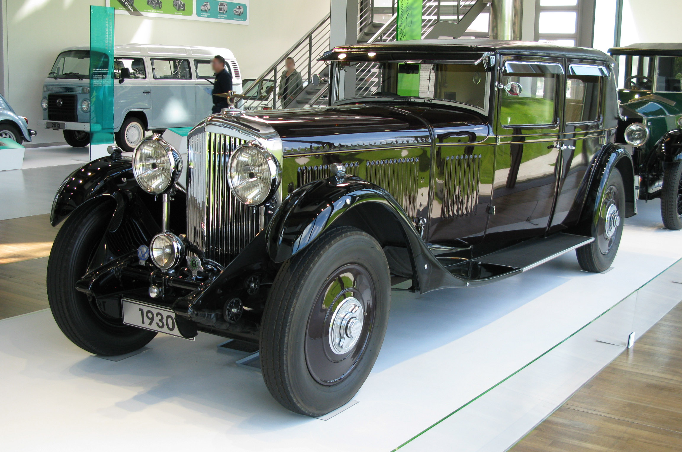 1930 Bentley 8 Litre Limousine